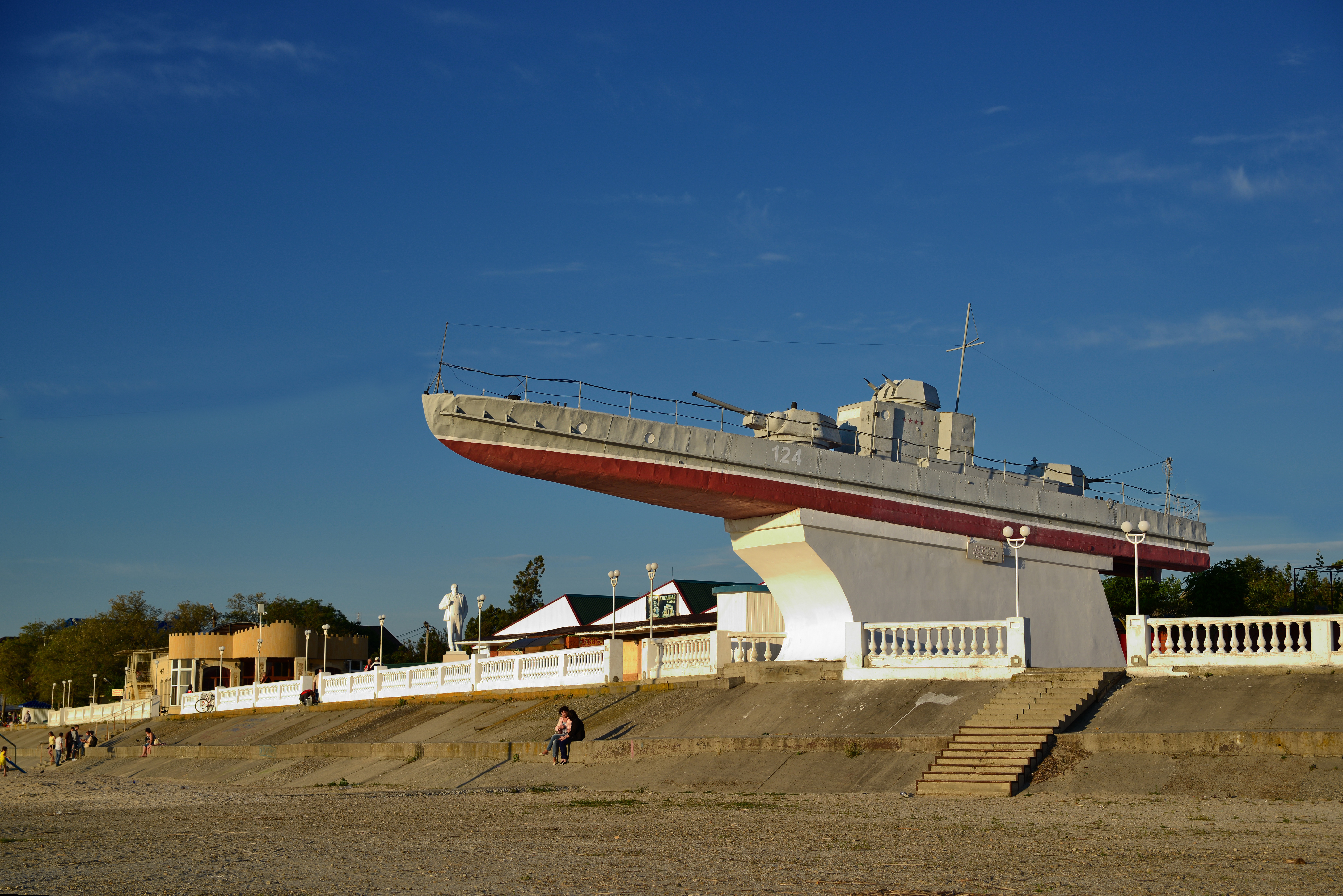 бронекатер № 214, установленный в честь моряков азовской военной флотилии: улица 50 лет октября, берег моря, Приморско-Ахтарск, Приморско-Ахтарский район, Краснодарский край